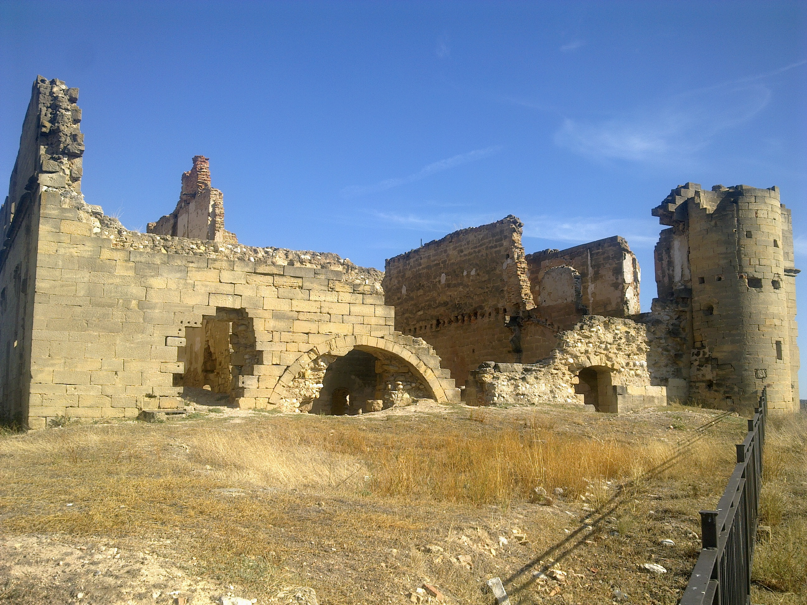 Castell del Comte d'Aranda